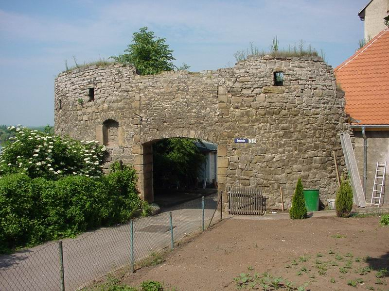 Seeburg, Torburg eigenes Foto von 2004